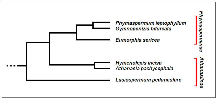 Cladogramma della sottotribù Phymasperminae